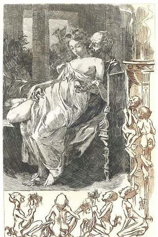 Dessins de Martin van Maële. Illustration du Thais d'Anatole France. 1901.